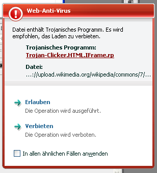 zur Illustration Forum